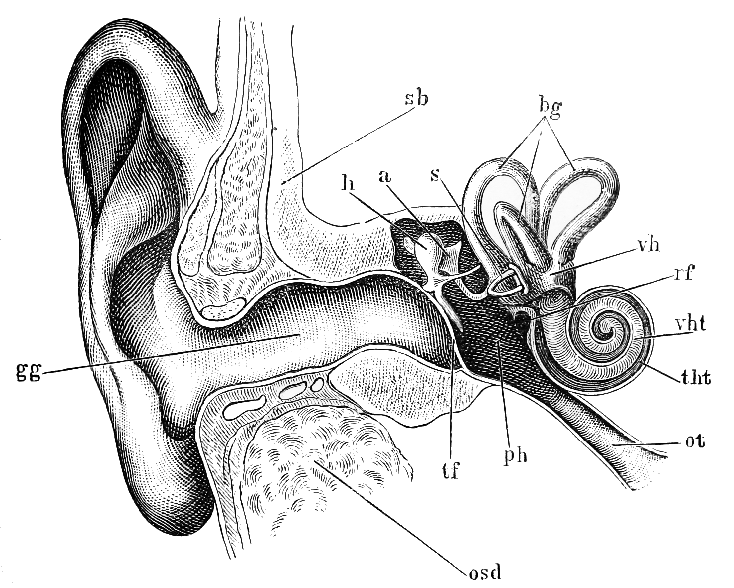 "Tidens naturlære" 1903 af Poul la Cour, Fig. 40. Øret i lodret Stilling, gg. Øregangen, tf. Trommehinden, ph. Trommehulen. h. Hammeren, a. Ambolten, s. Stigbøjlen, bg. Buegangene, vh. Forgaarden. tht., vht Sneglen, ot Eustachiske Rør. osd. Ørespytkirtelen, sb. Tindingebenet rf. Det runde Vindue. Bogen findes digitalt på Tidens Naturlære "Tidens naturlære" (Nature of time) 1903 by Poul la Cour, Ill. 40. The book is digitized at Tidens Naturlære